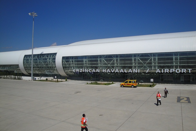 Erzincan Havalimanı ön görünüm/girişi, 2011.